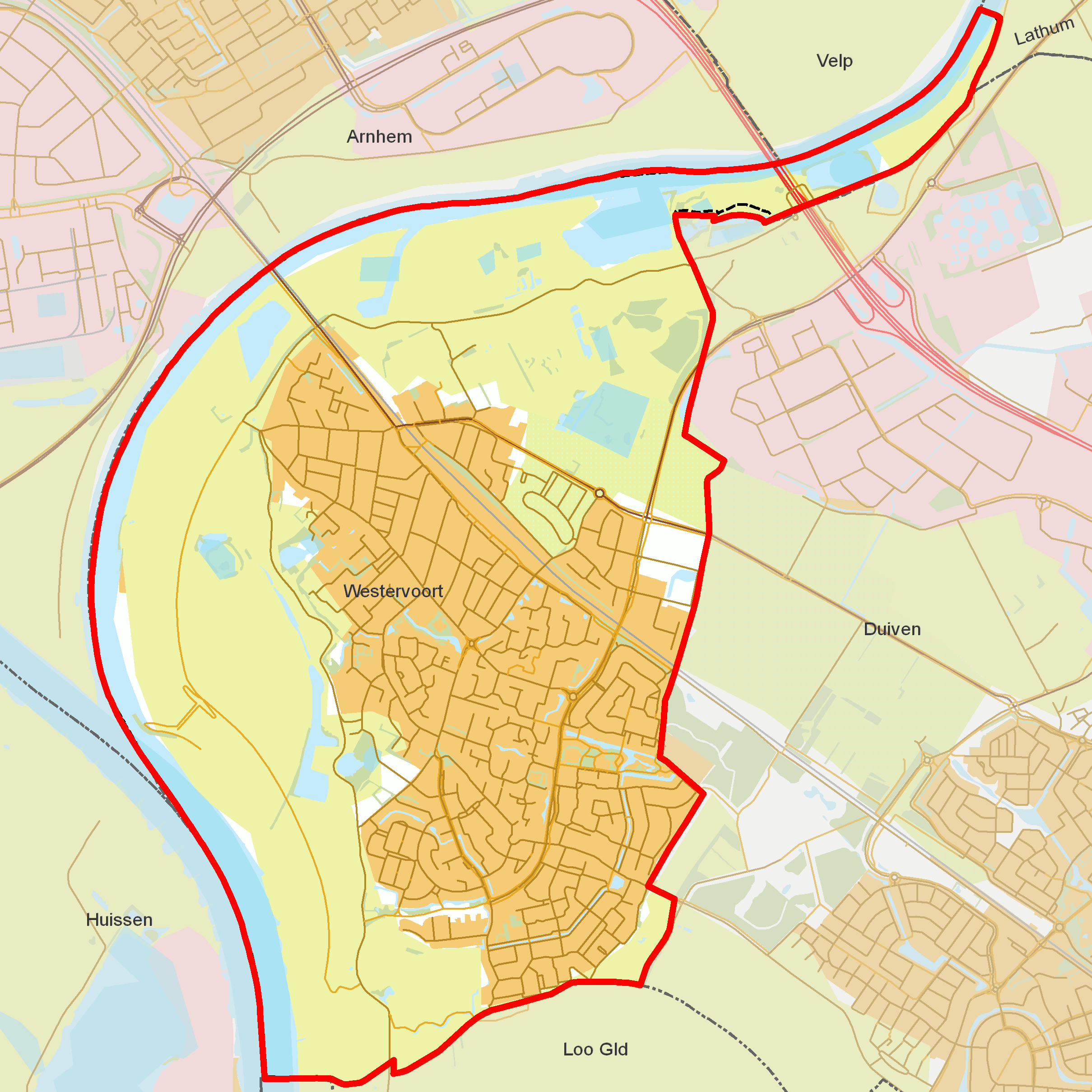 BAG woonplaatsen - Gemeente Westervoort.png